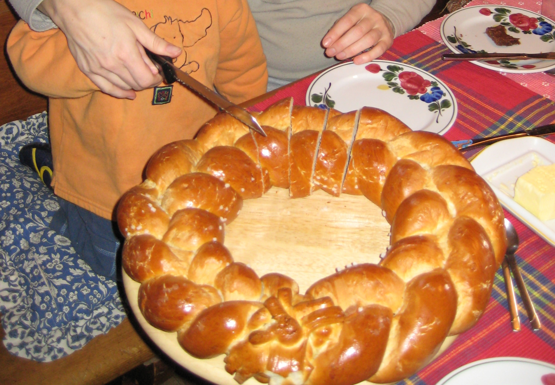 Patenkind darf den Eierring anschneiden